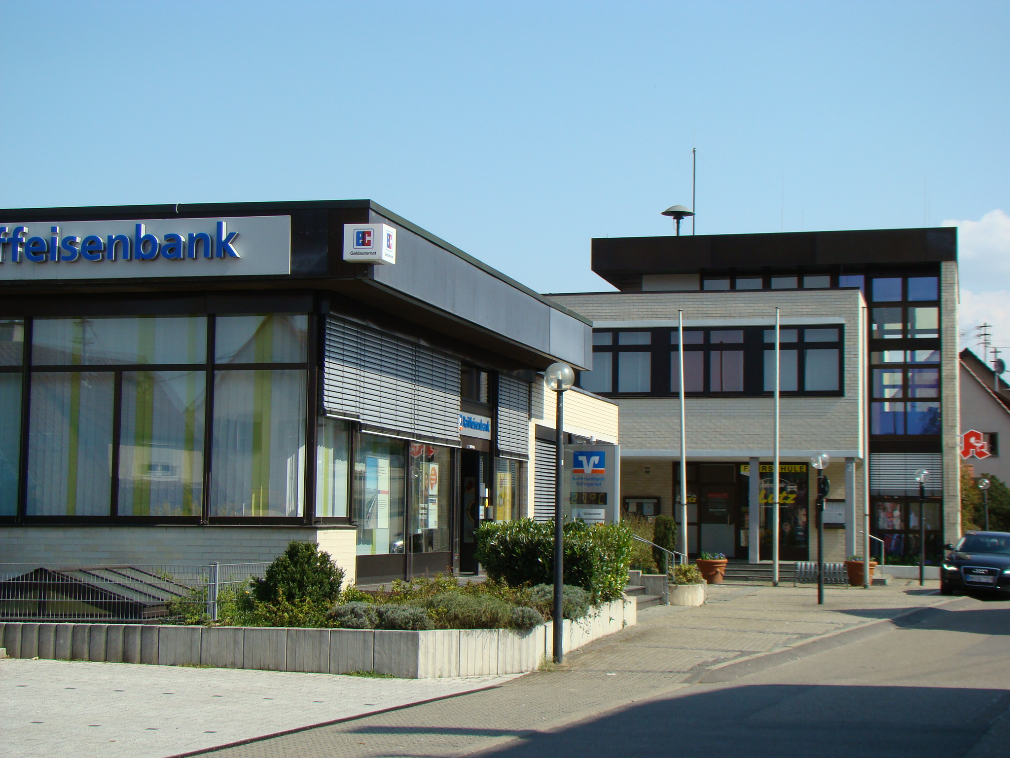 Bürgerbüro in Heilbronn-Biberach